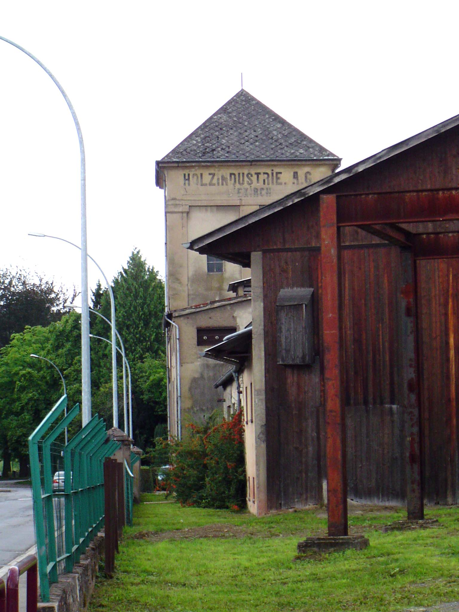 Holzindustrie (Dikkrech).